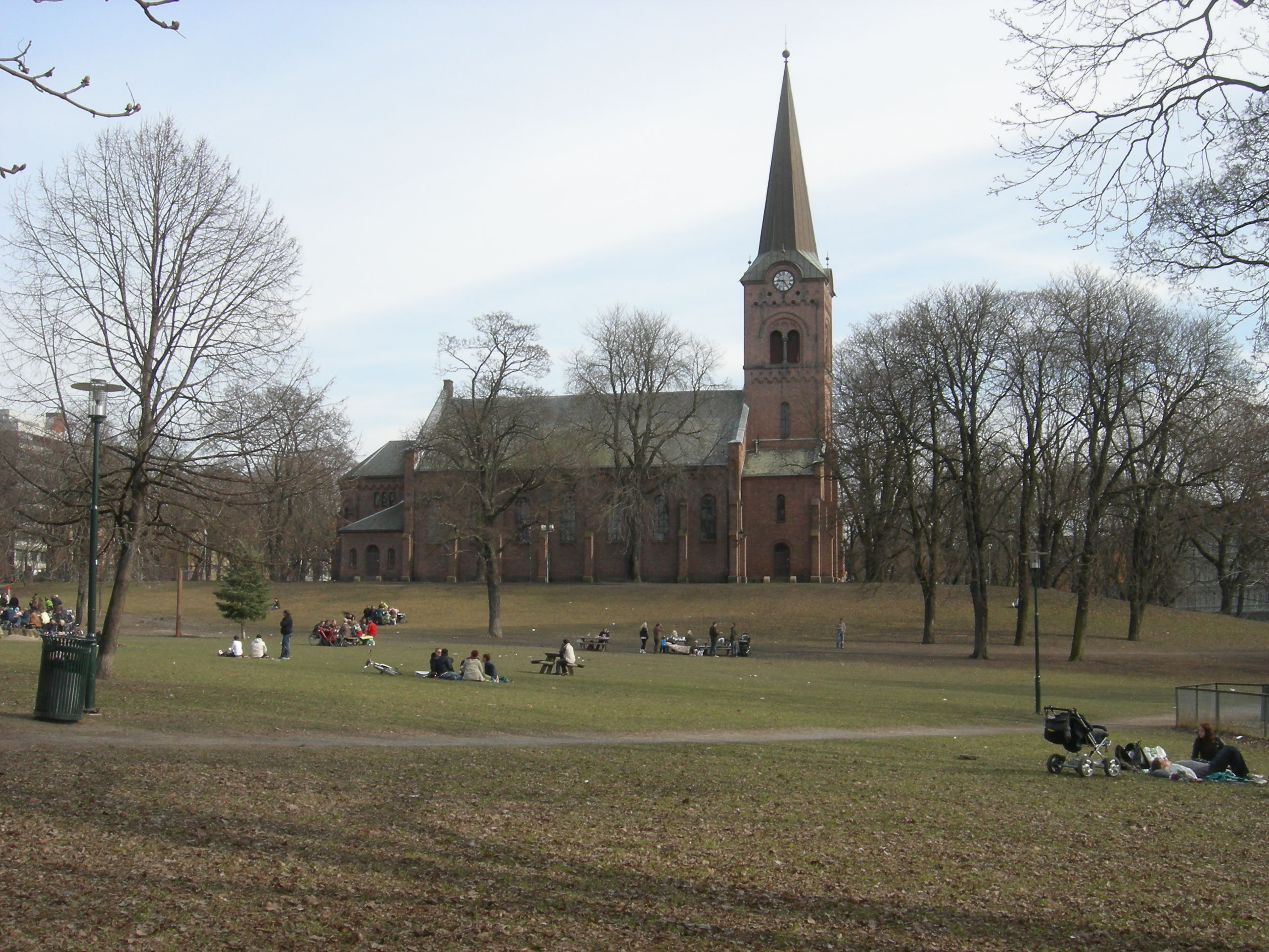 Sofienberg park, Oslo, Norway